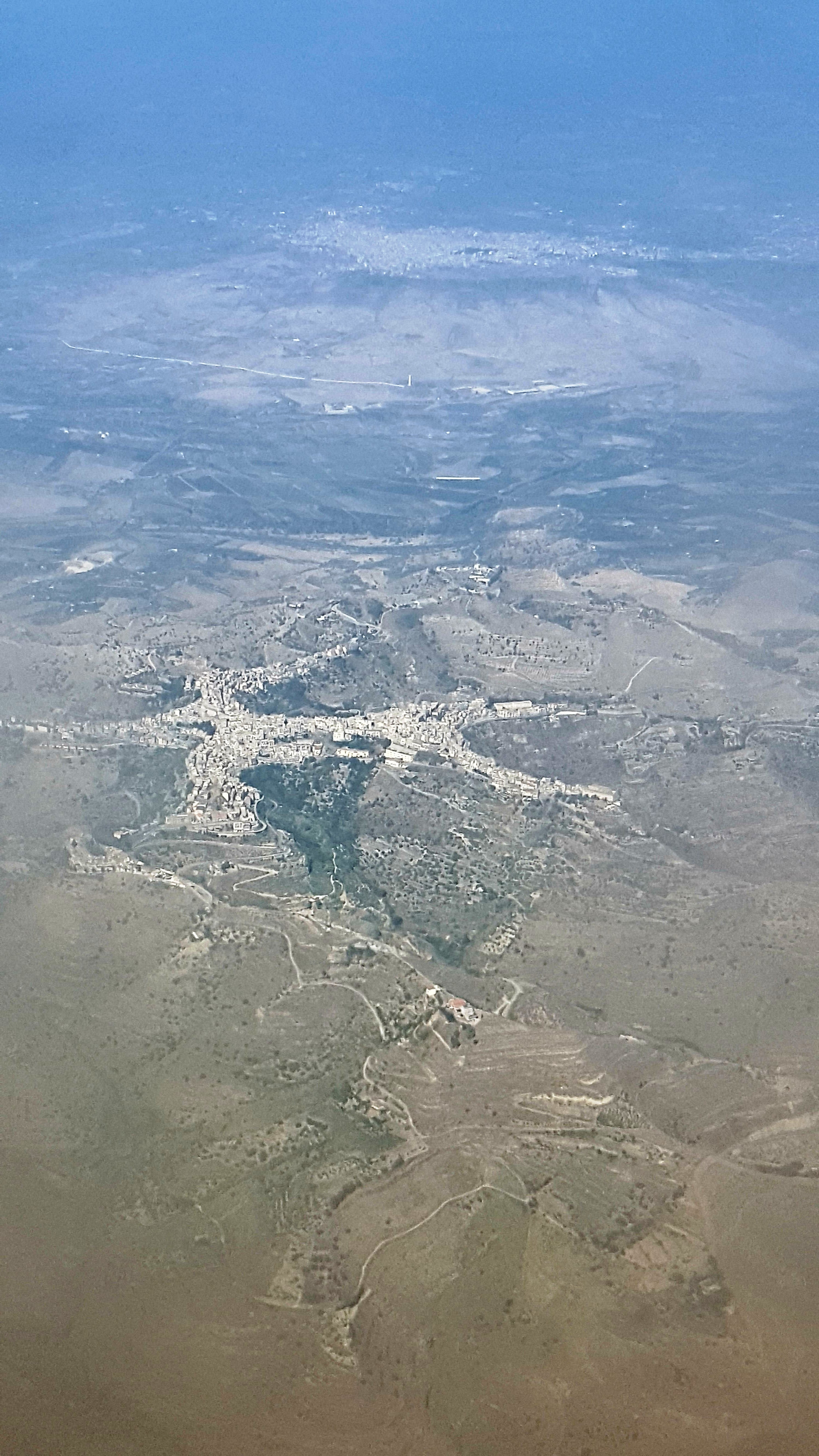 Centuripe vista dall'aereo